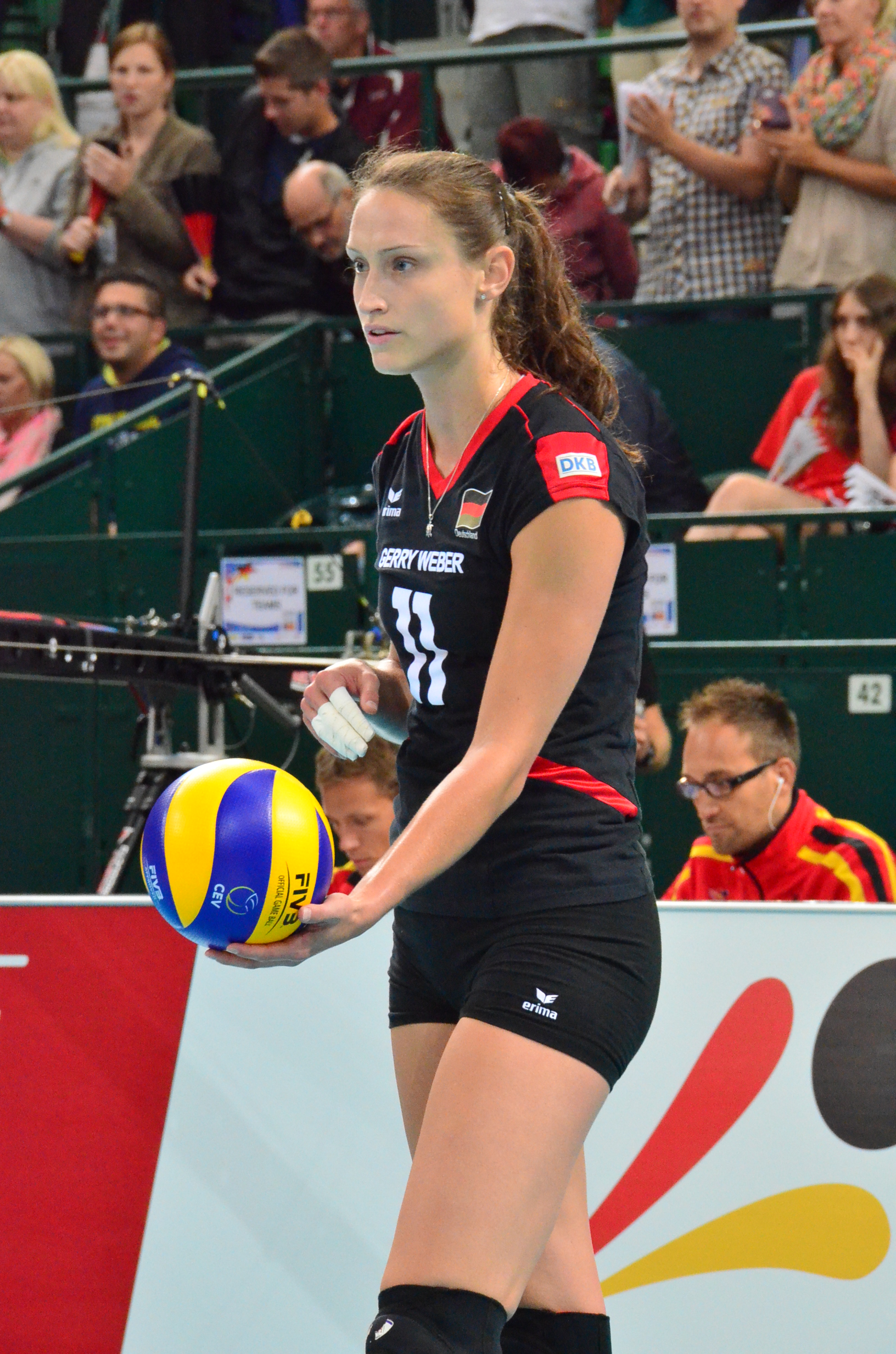 Volleyball-Europameisterschaft der Frauen 2013-Spielort Halle (Westf) Gerry-Weber-Stadion - Spiel 8. September 2013 (Deutschland-Türkei)